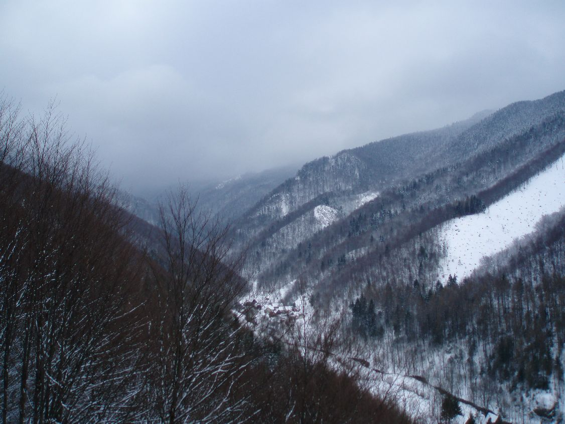 Belianska dolina, pohľad na osadu Frankovci (Malá Fatra)(Belianska dolina, view on settlement Frankovci.Lesser Fatra, Slovakia)